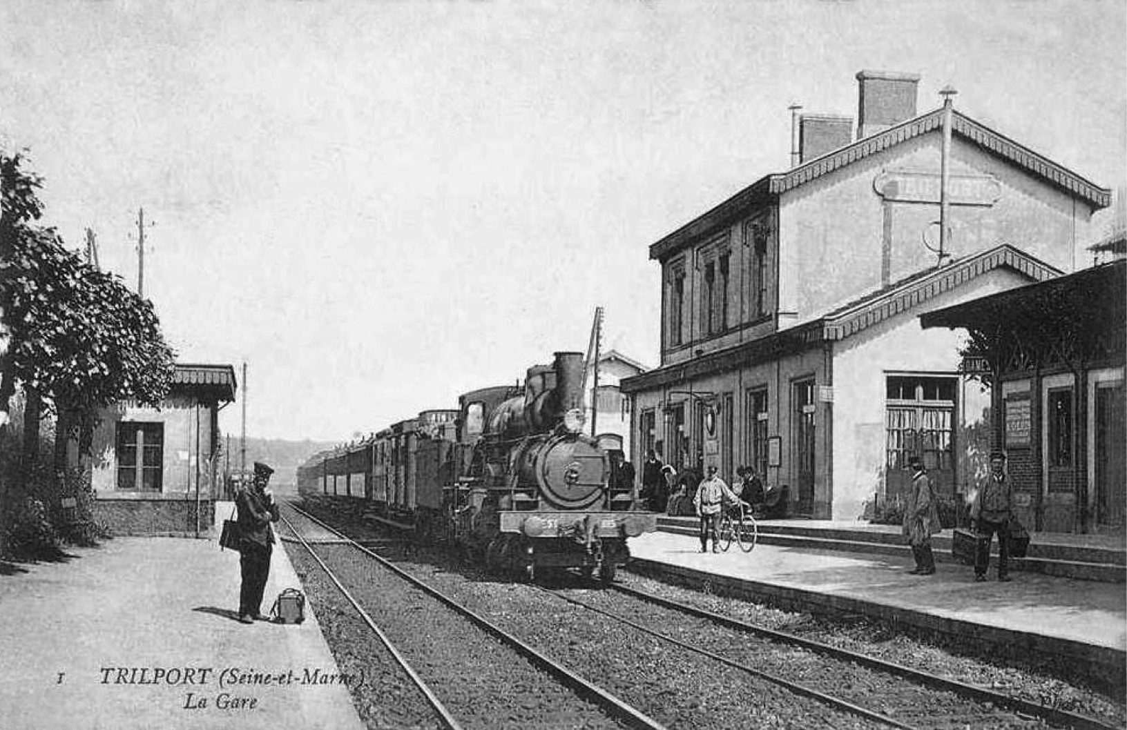 L'intérieur de la gare de Trilport, avec l'arrivée d'un train à vapeur au début des années 1900.